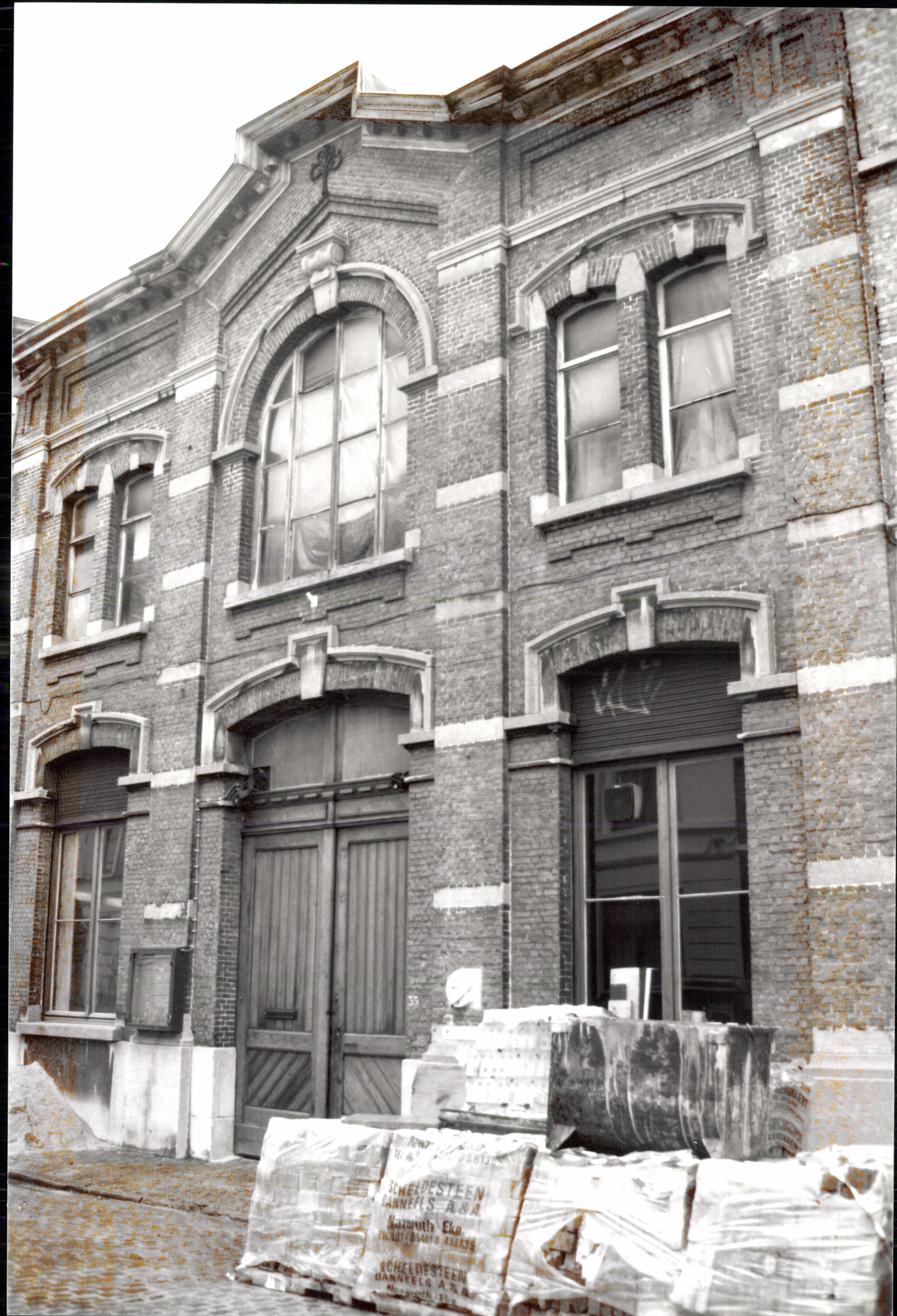 Pakhuis vlasspinnerij La Lys S.A.